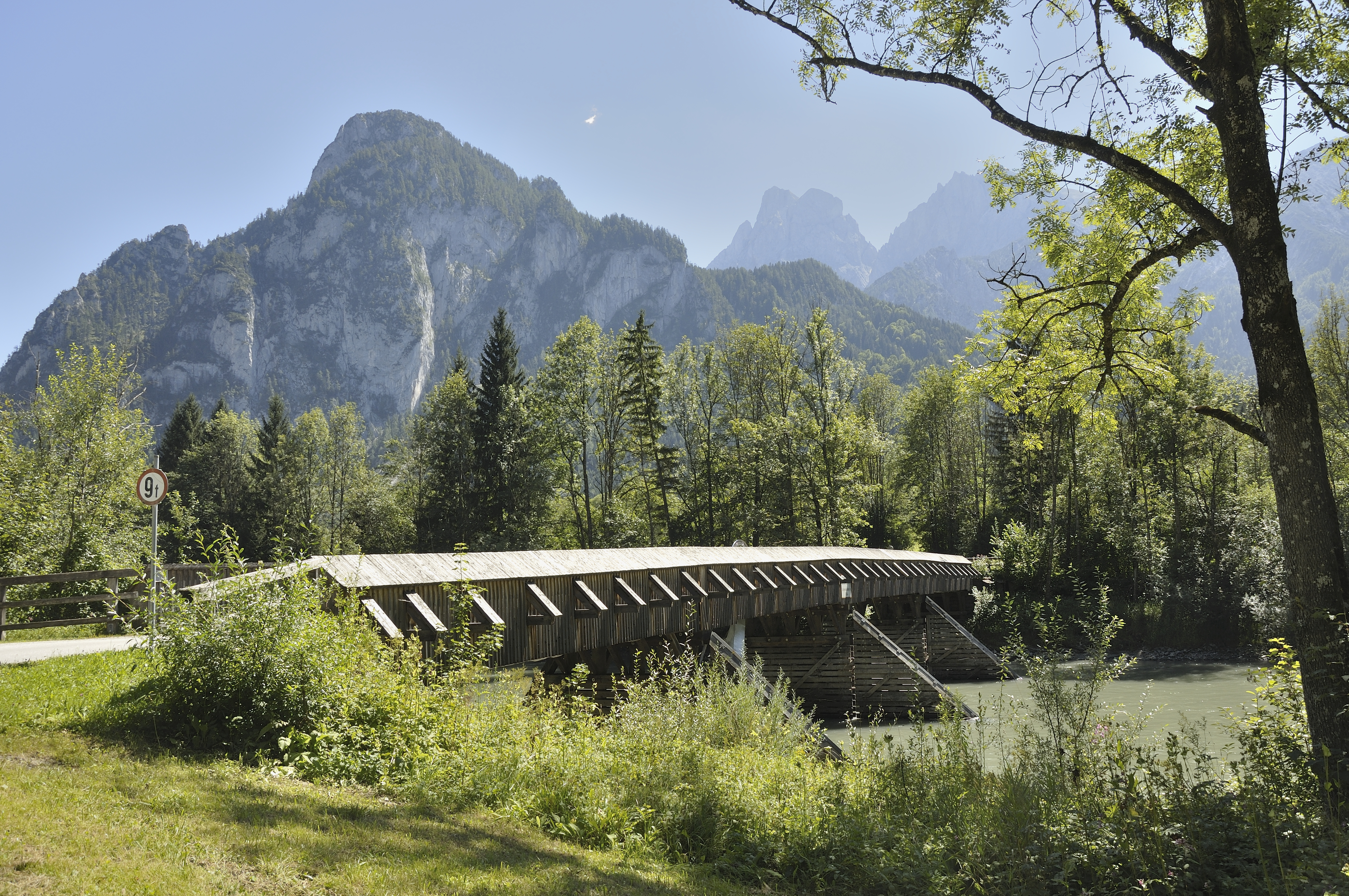 neue Lauferbauerbrücke über die Enns zwischen den Gemeinden Admont und Weng.